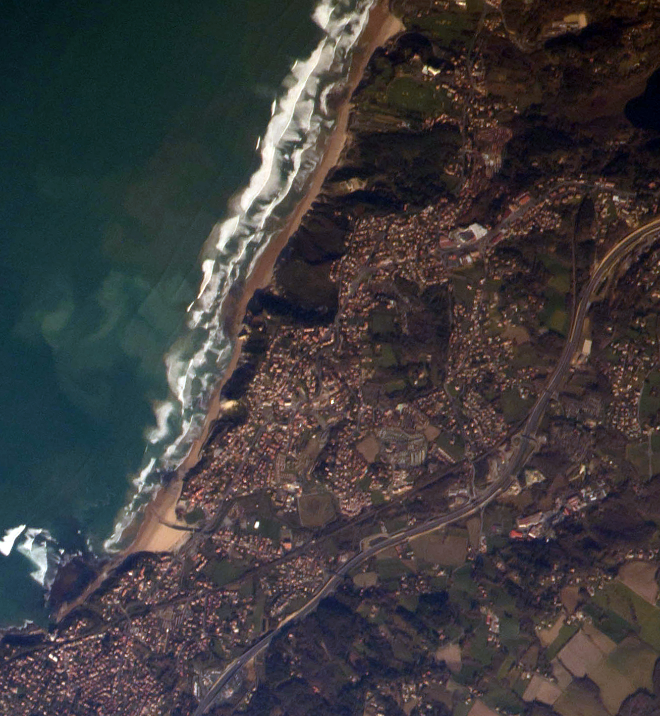 Bidarte, Nazioarteko Espazio Estaziotik ikusia.